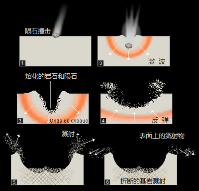 中文（中国大陆）: 撞击坑形成示意图